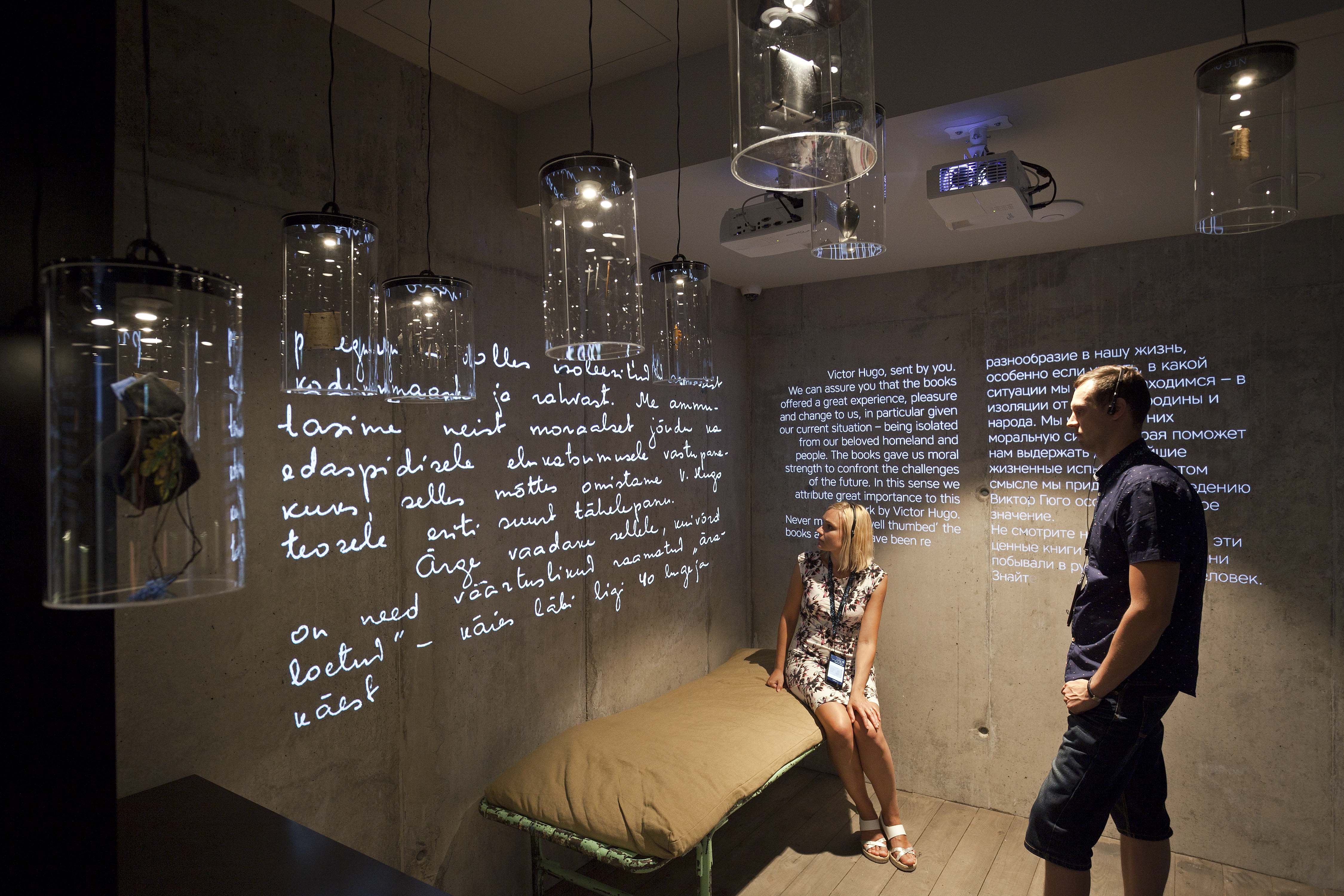 Püsinäitus "Vabadusel ei ole piire"